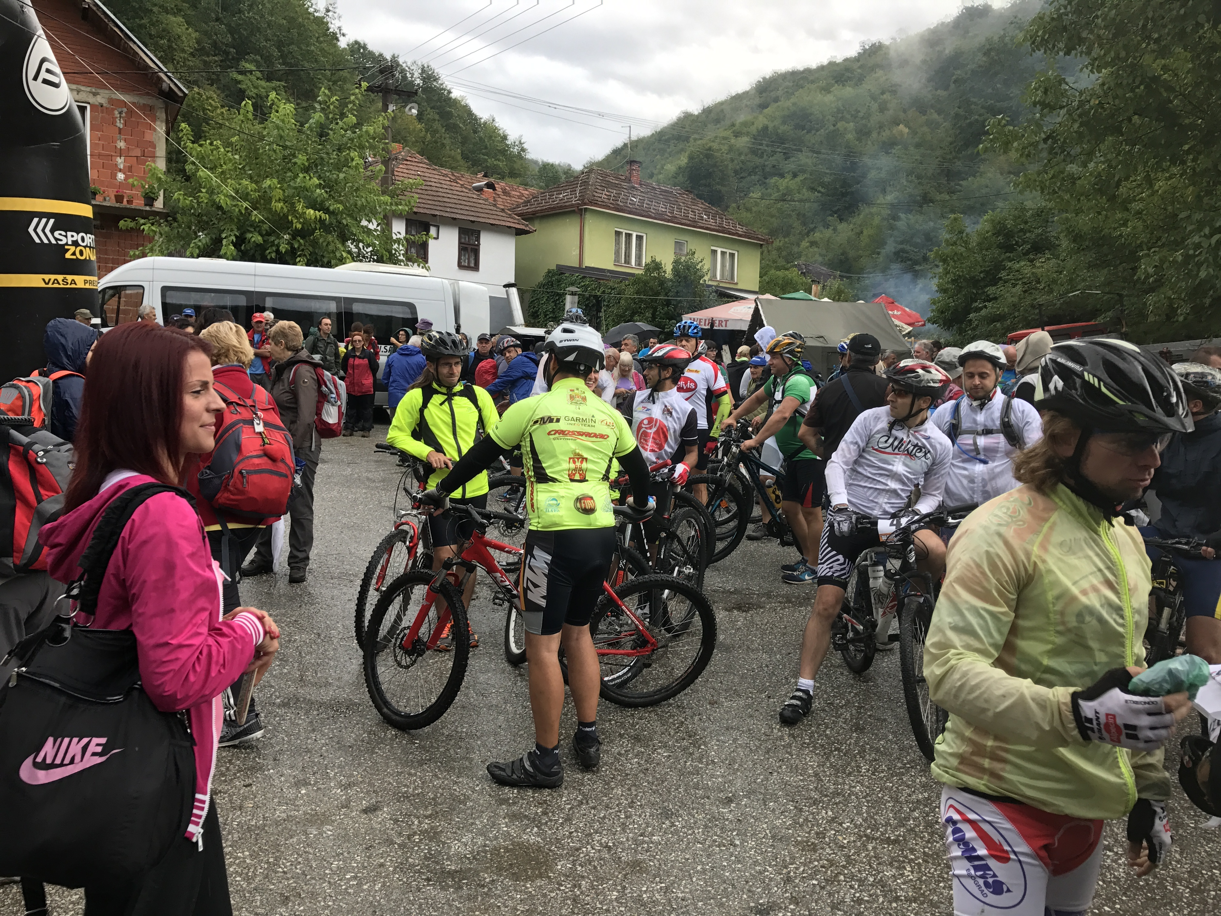 Дуленски МТБ маратон